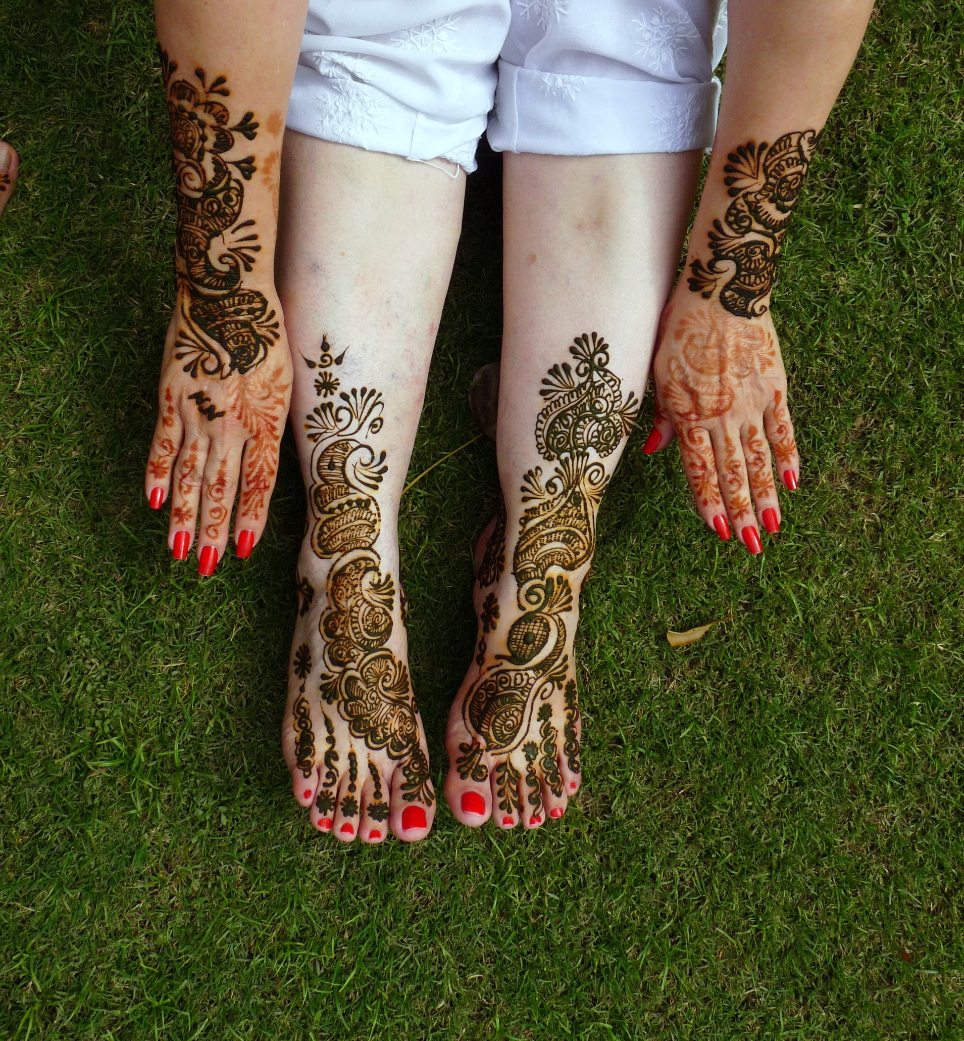 Distintos colores de la aplicación de henna (mehndi)